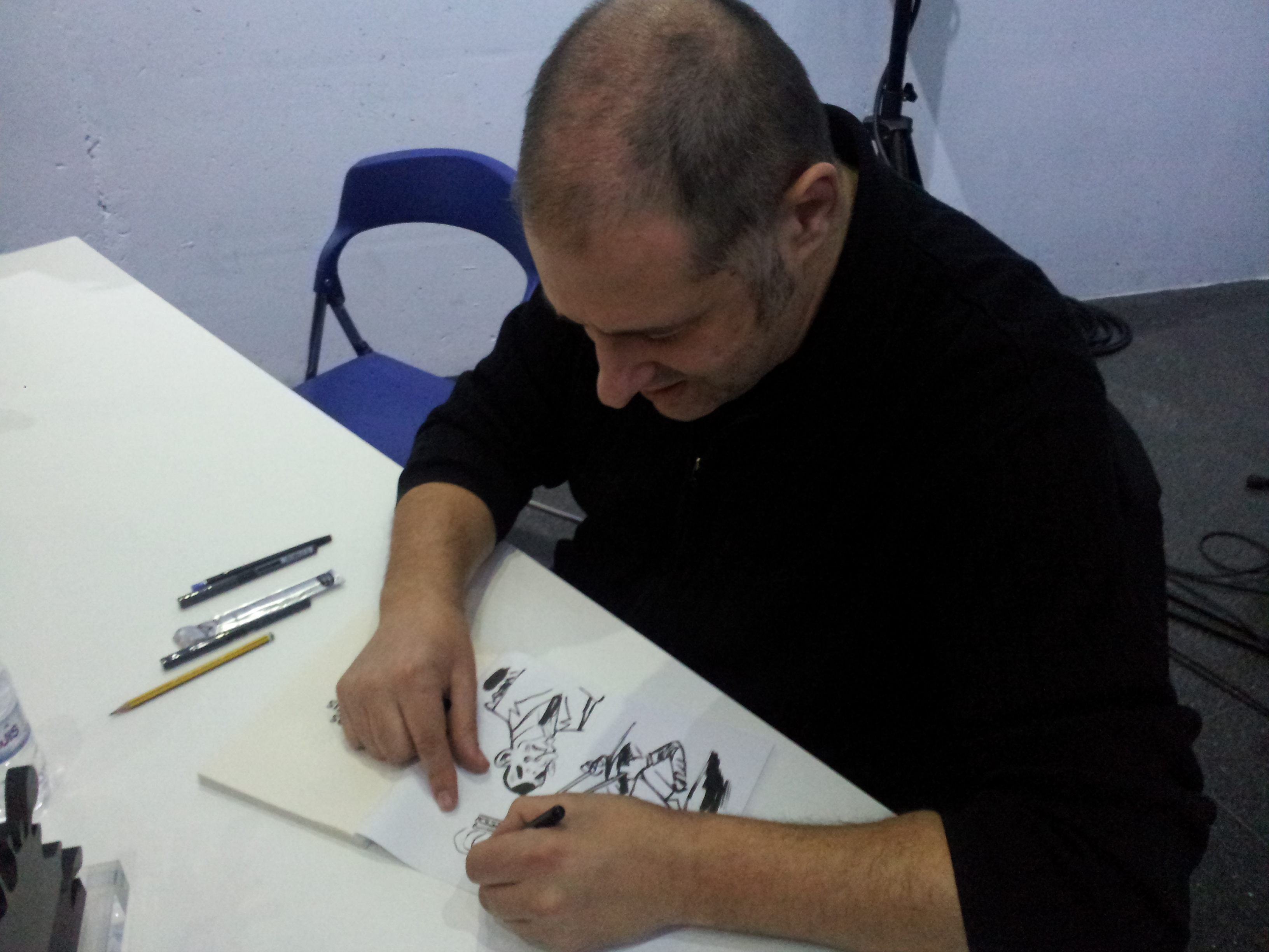 Festival de còmic Splash Sagunt 2015.